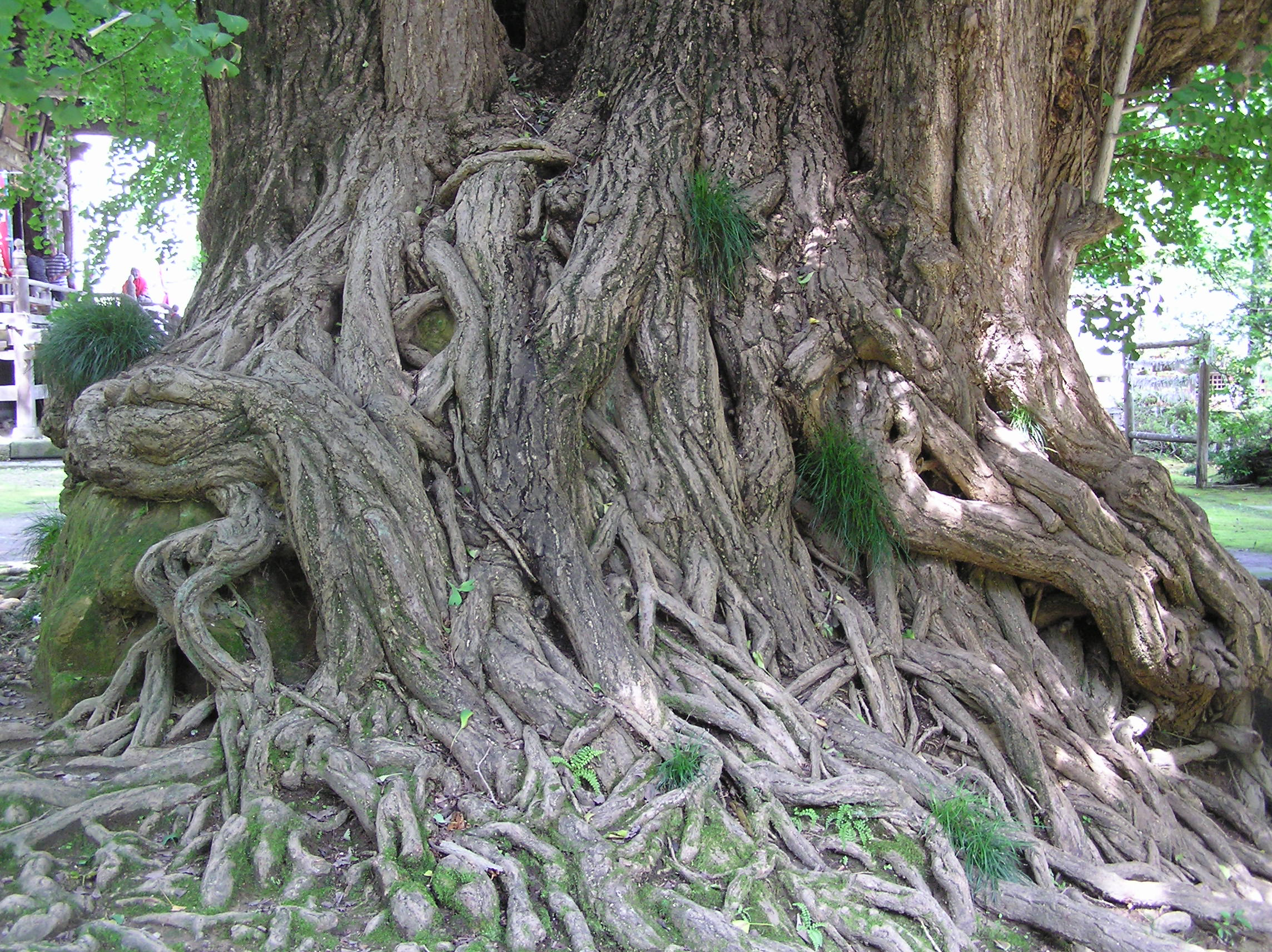 埼玉県東松山市の正法寺にある大銀杏